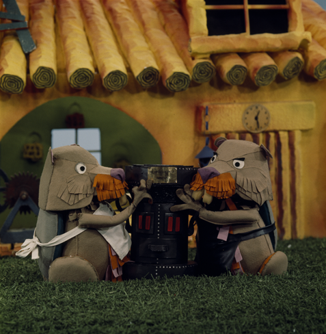 Ed & Willem Bever uit de Fabeltjeskrant